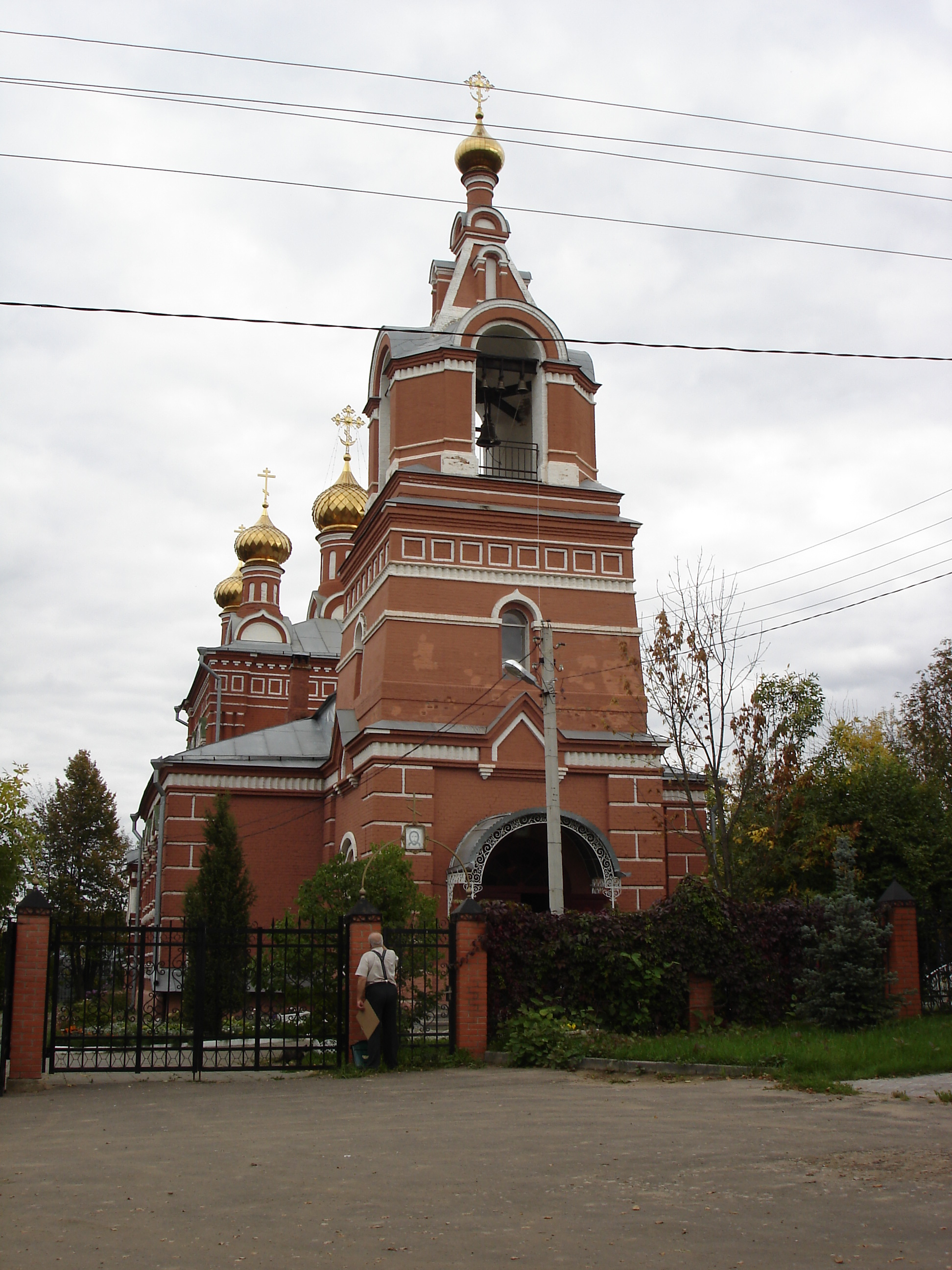 Церквь в деревне Большое Свинорье, Новомосковский административный округ, Москва.